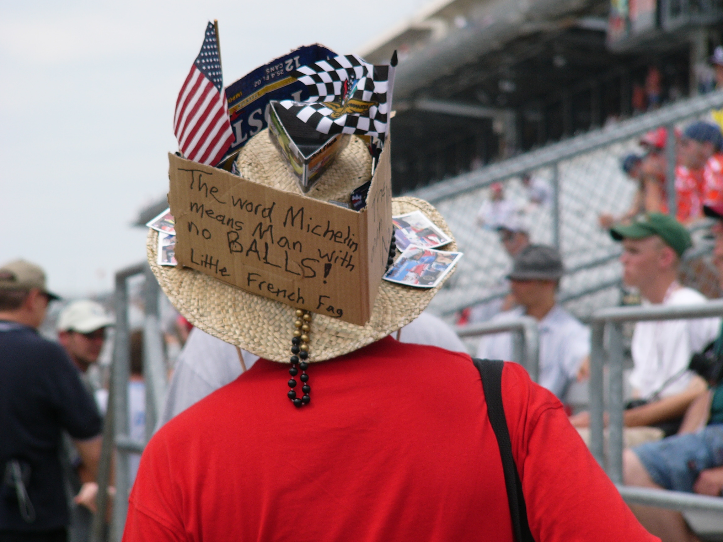 アレですアレ